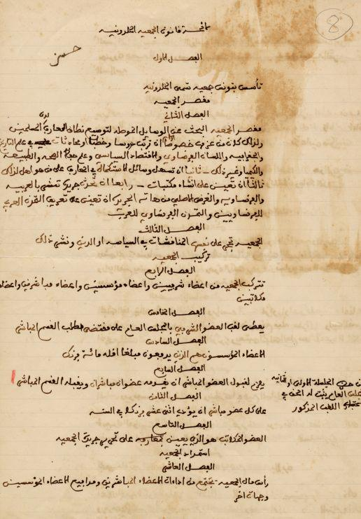 Première page de la loi interne de l'Association Khaldounienne, Tunisie